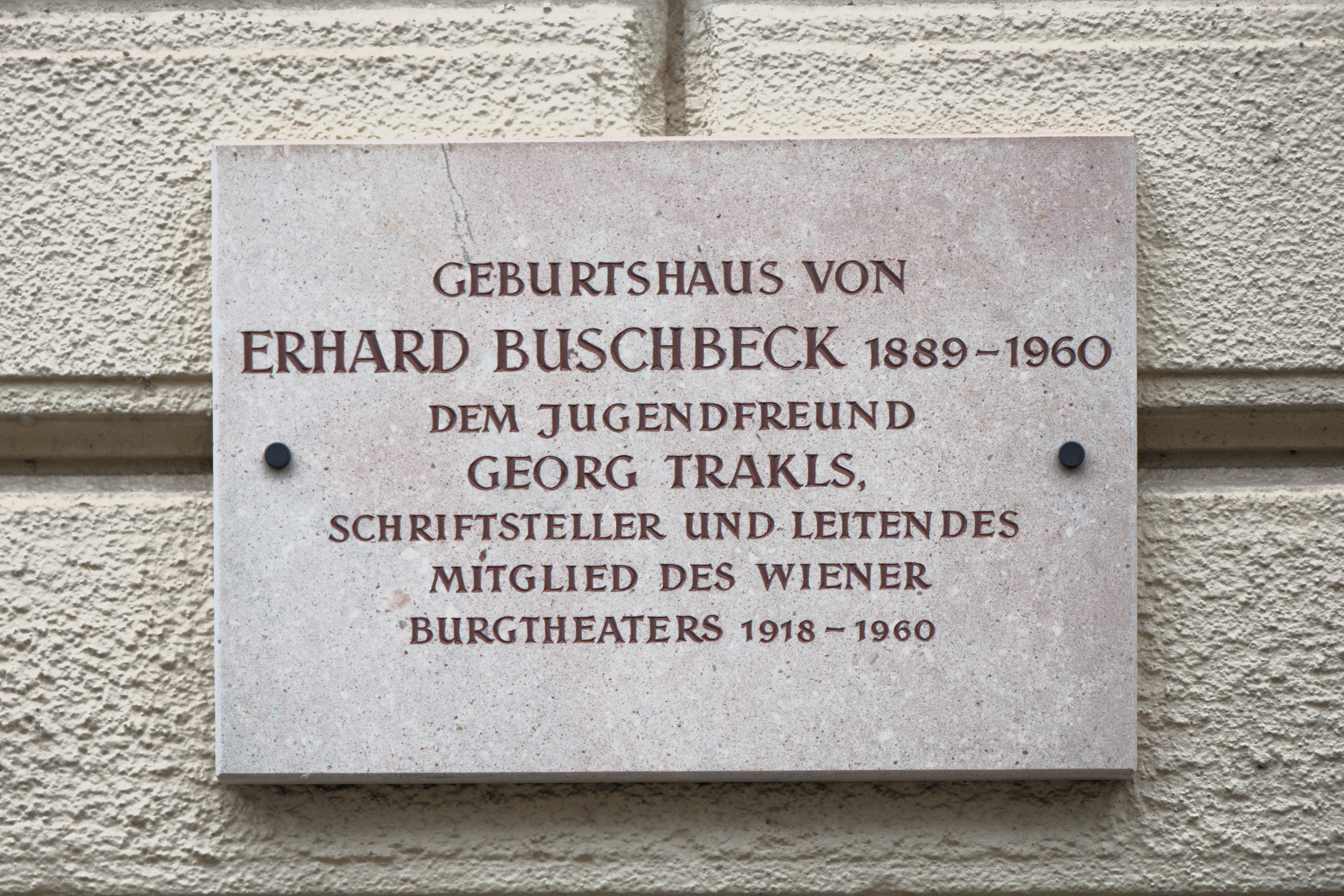 Salzburg, Stadtteil Neustadt: Haus Ernest-Thun-Straße 9